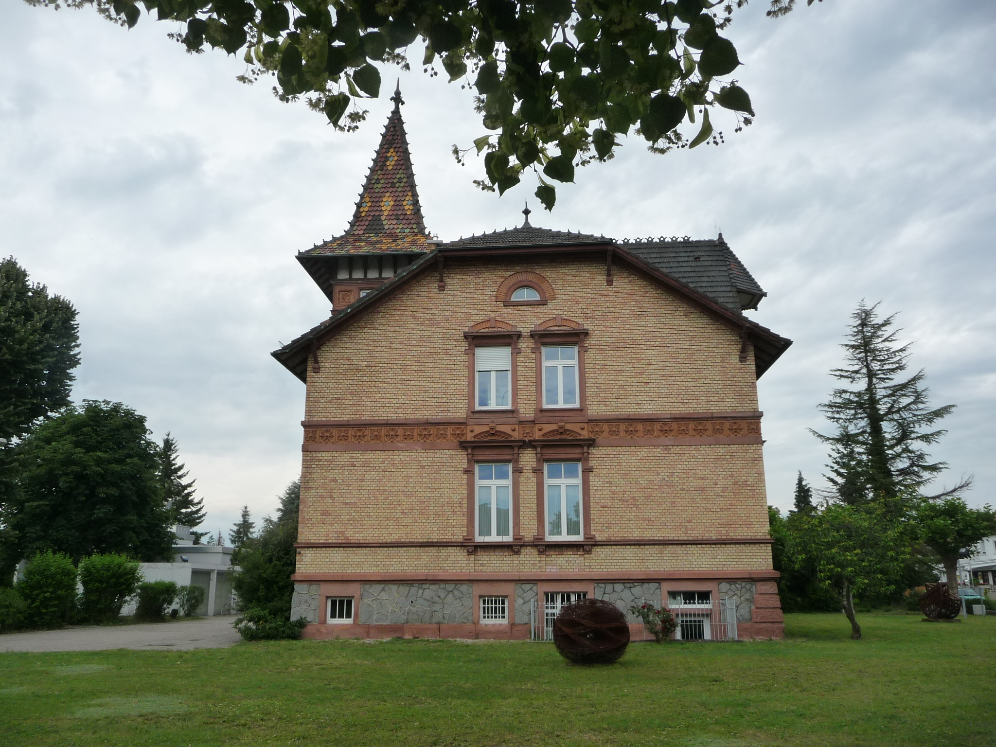 Rathaus in Jockgrim, Kreis Germersheim